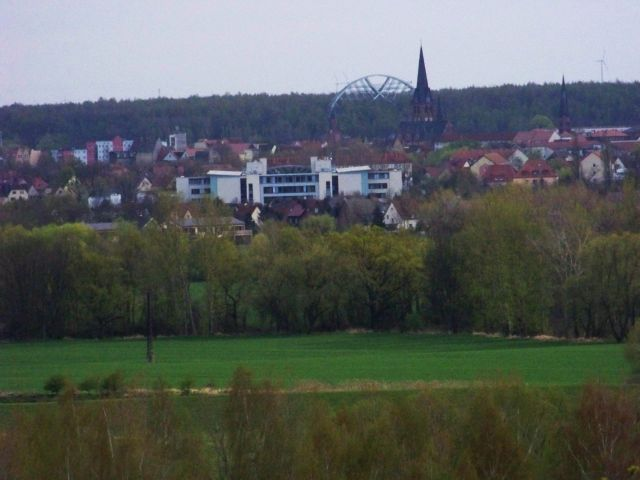 Bitterfeld und der Bitterfelder Bogen vom Muldensteiner Berg aus gesehen